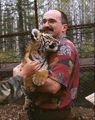 Andreas Gruschke mit einem drei Monate alten Mandschurischen Tiger (auch Sibirischer Tiger) in einem Gehege am Changbai Shan (Provinz Jilin, VR China)